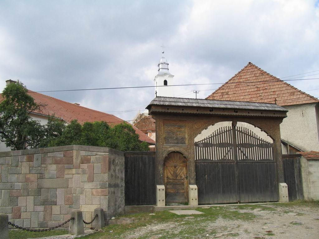 Lövéte székelykapu (hu), Lueta (ro)